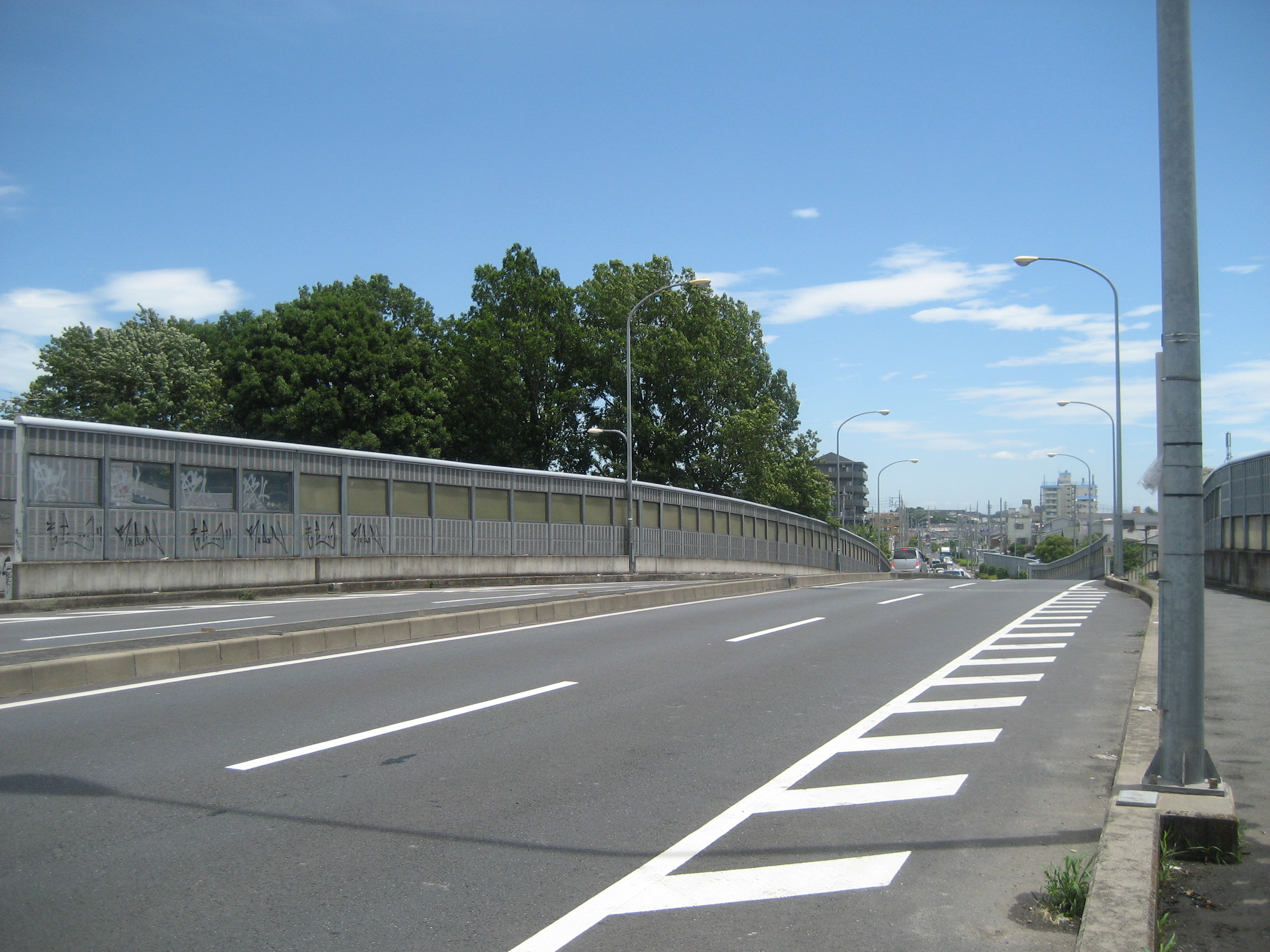 国道463号線新浦和橋（浦和IC方向を撮影）